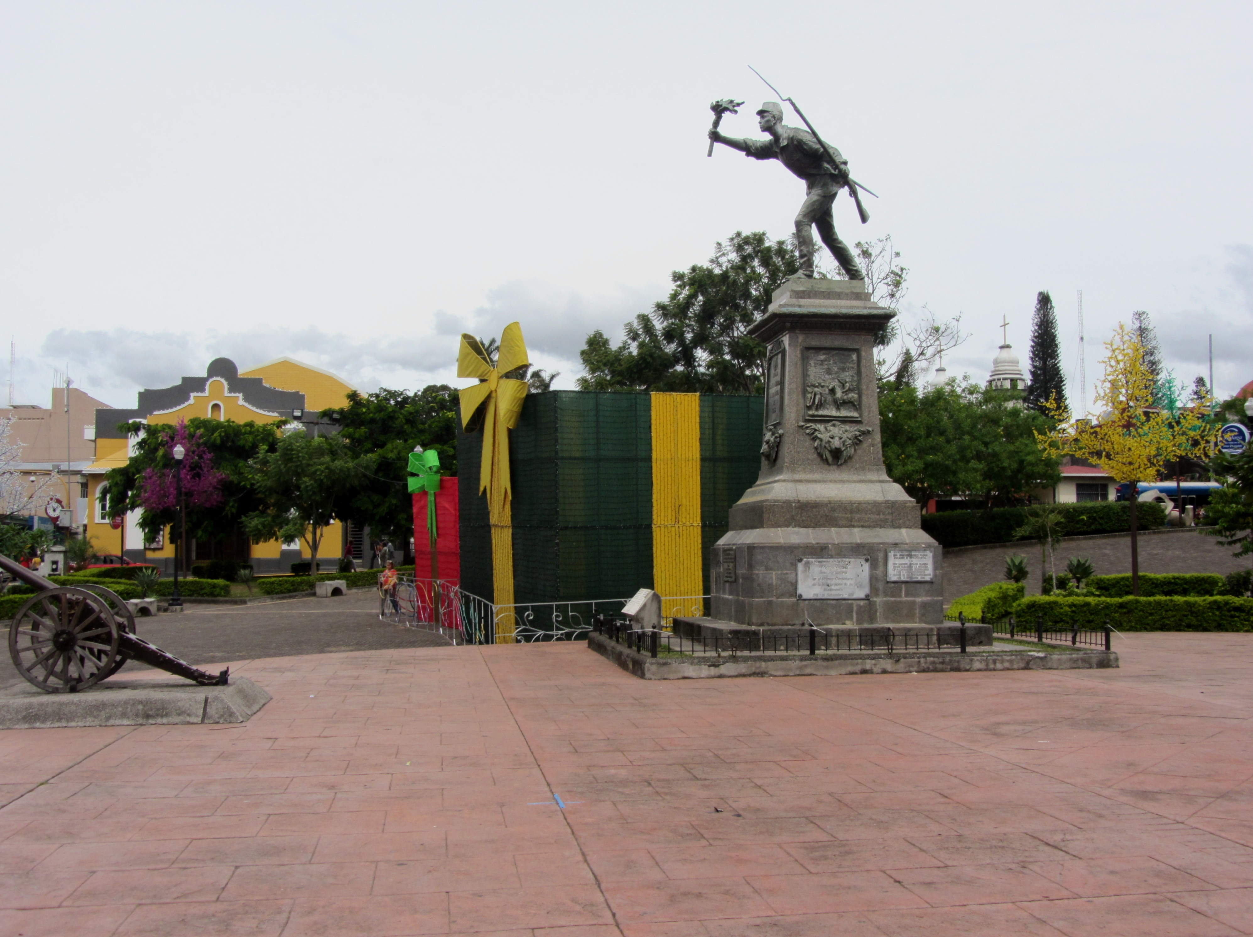 Estatua de Juan Santamaía, Alajuela, Costa Rica